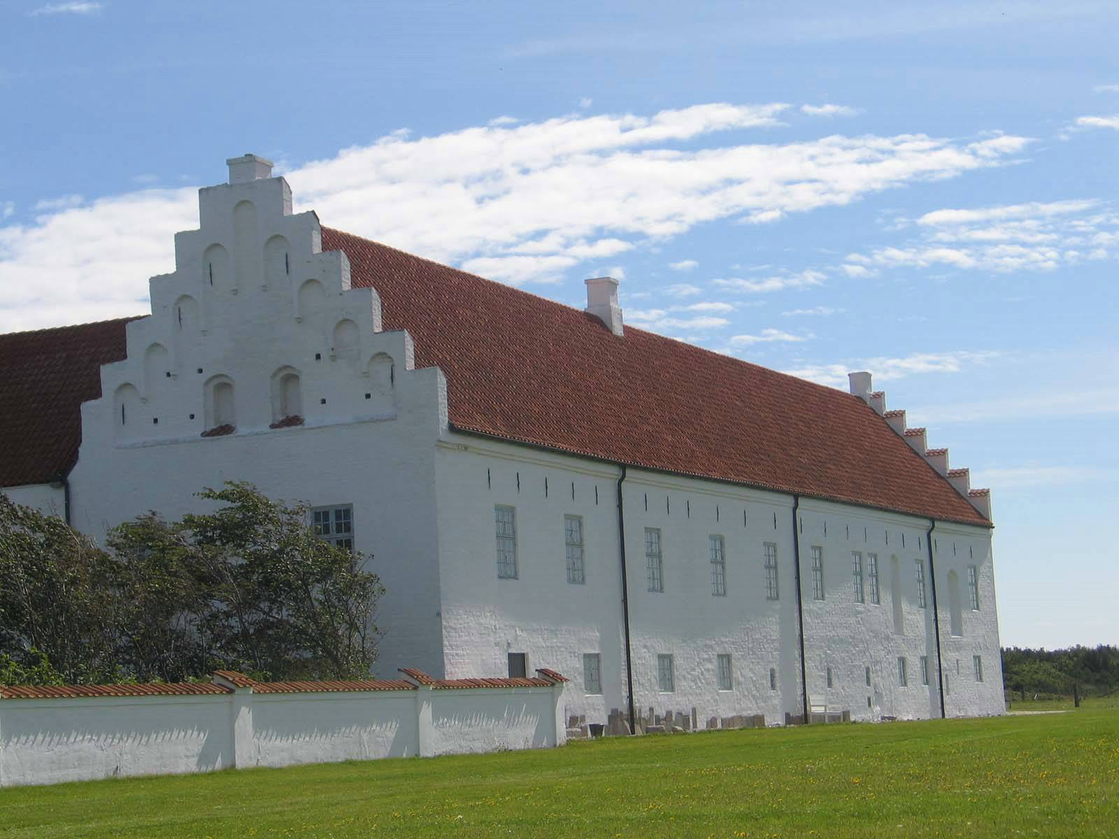 Vitskøl Kloster Foto: Nienke Jonker, PDFnet